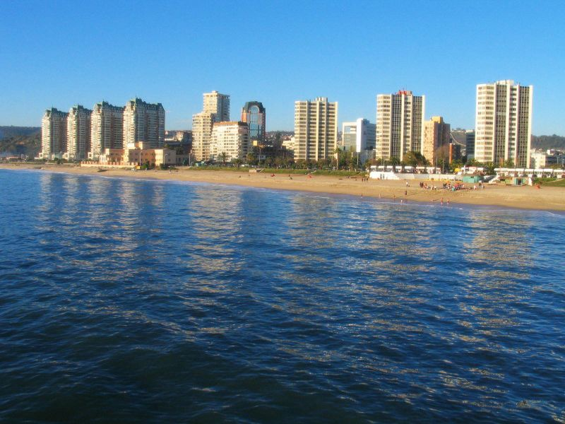 Vista de la costa, Viña del Mar, Chile